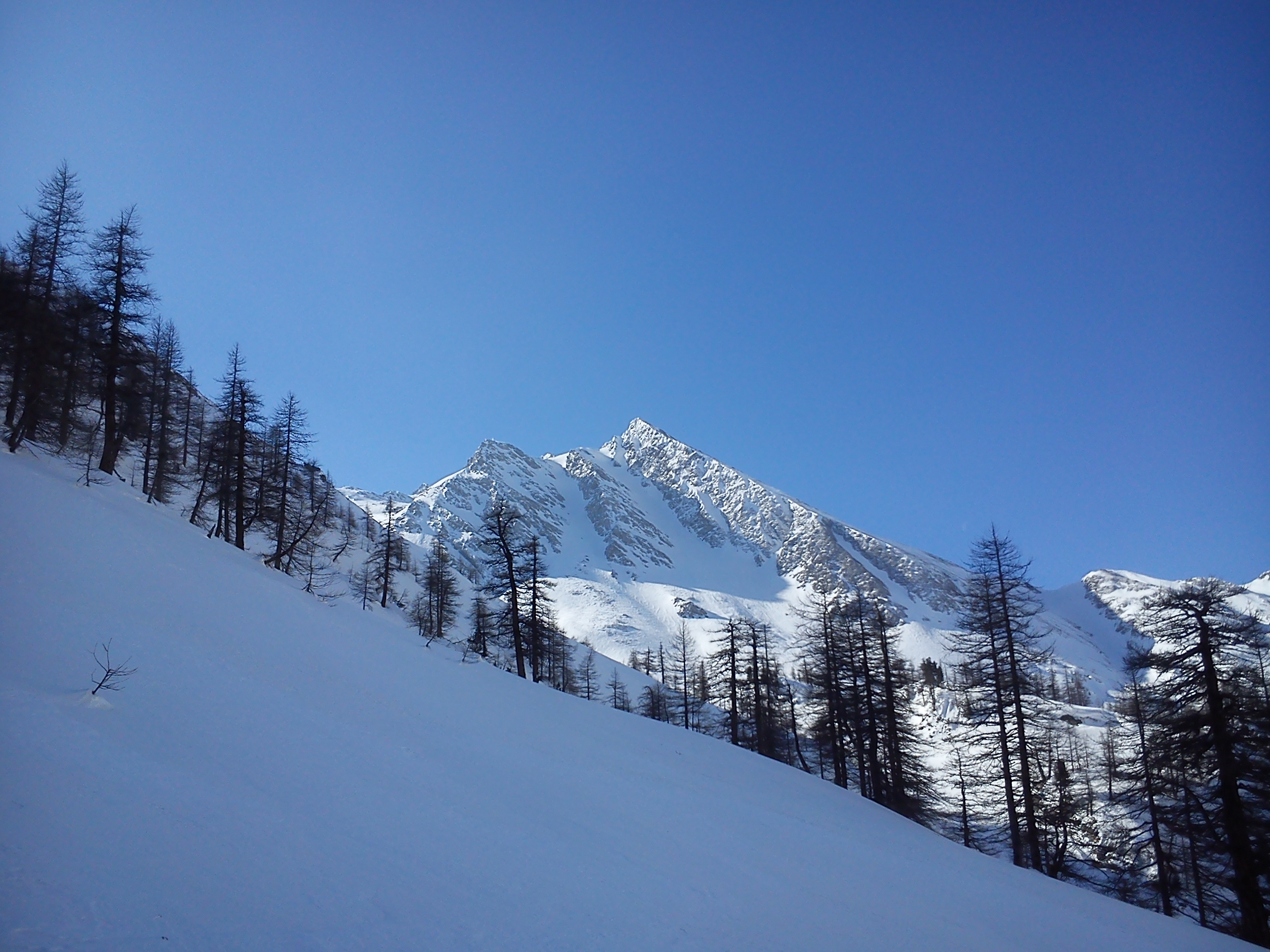 Montagna in alta Val Germanasca - Provincia di Torino